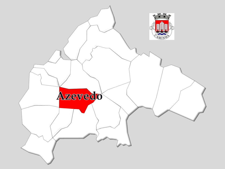 Censos 1864/2011